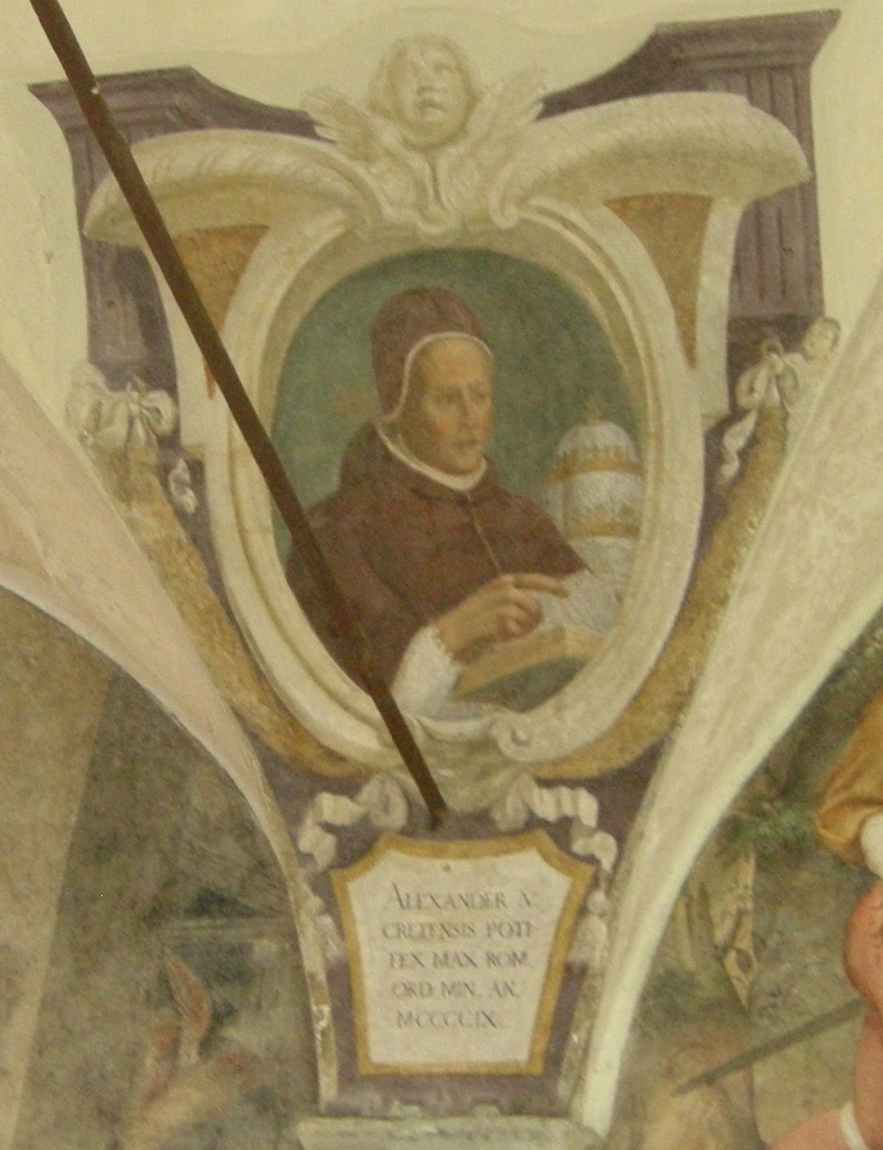 Chiostro di ognissanti, personalità francescane 02 Antipapa Alessandro V